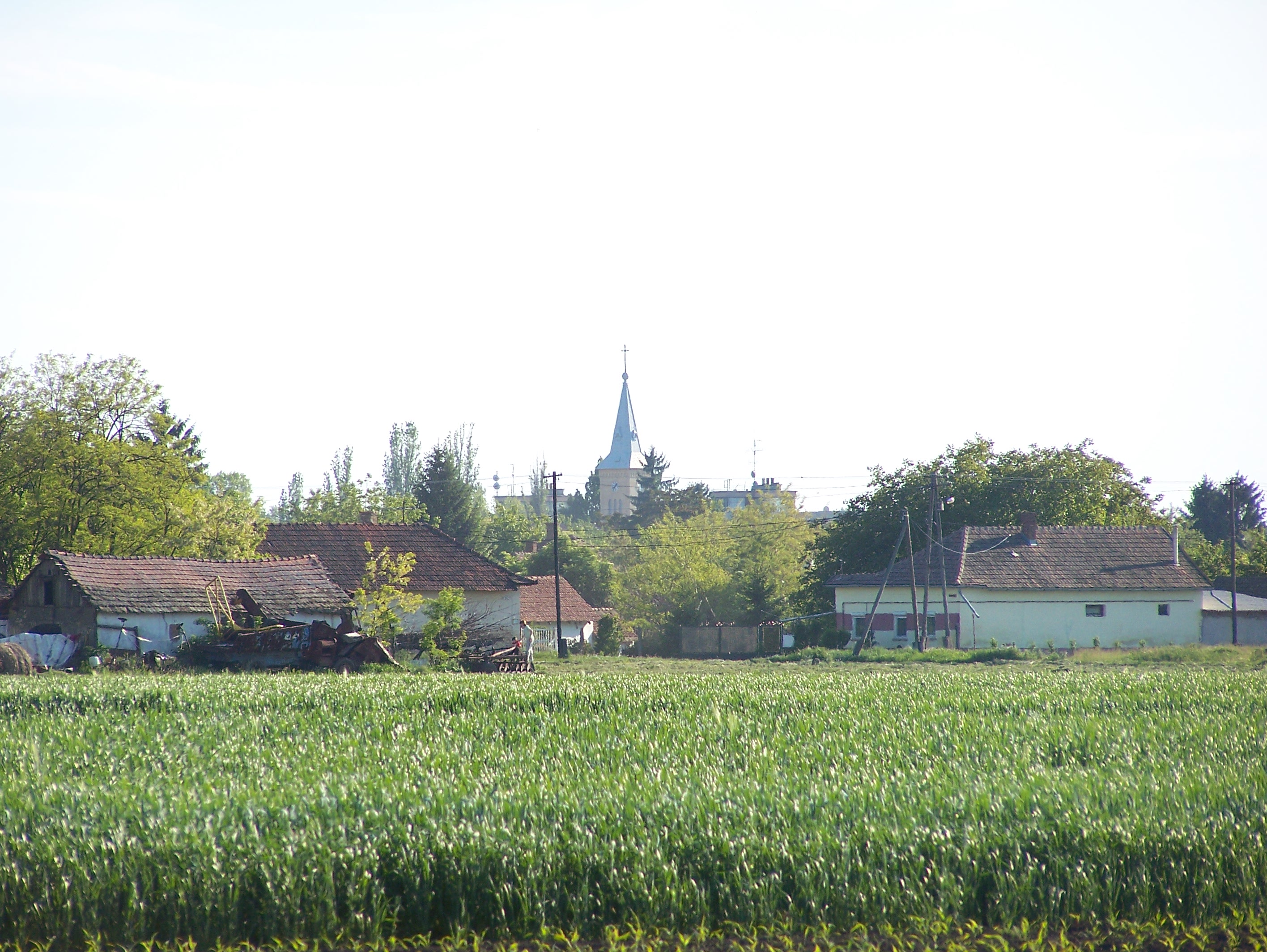 Falu a határról